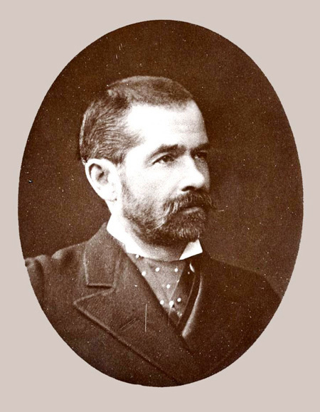 Лихачёв, Иван Фёдорович (1826—1907) — вице-адмирал (1874) русского флота, коллекционер искусства